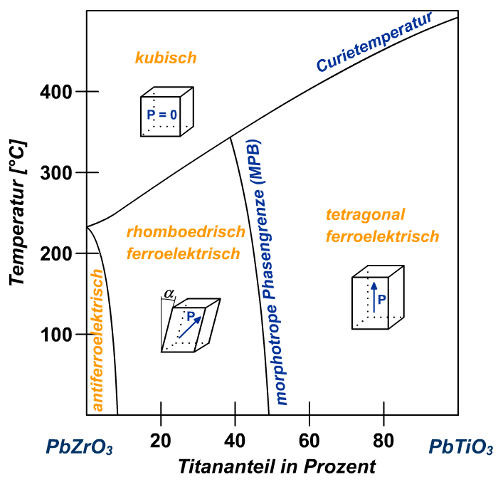 Phasen von Blei-Zirkonat-Titanat (PZT)